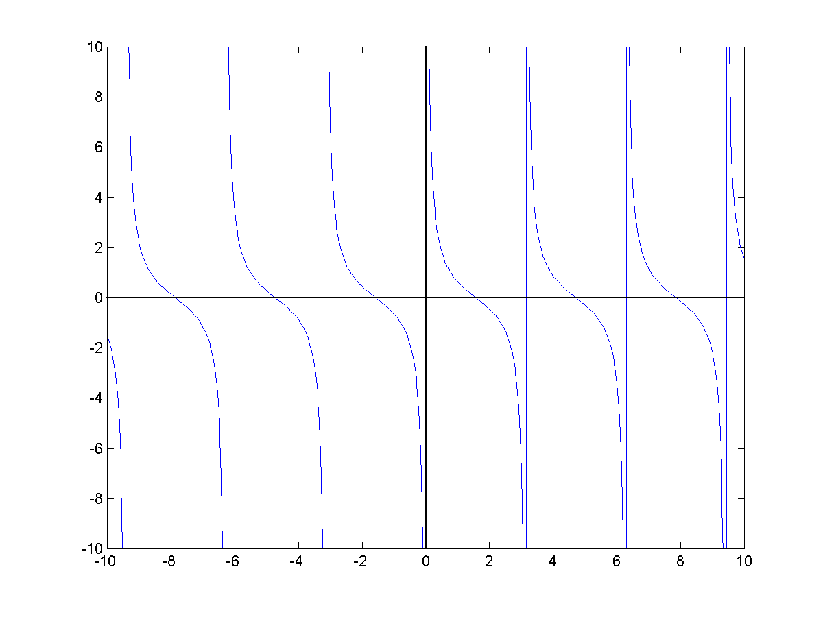 Figura feita por mim.